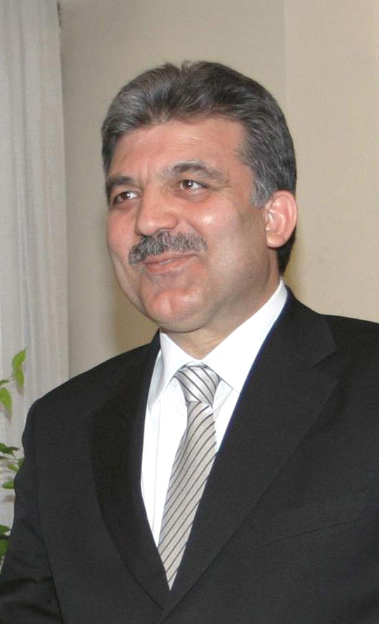 O ministro de Relações Exteriores da Turquia Abdullah Gül.